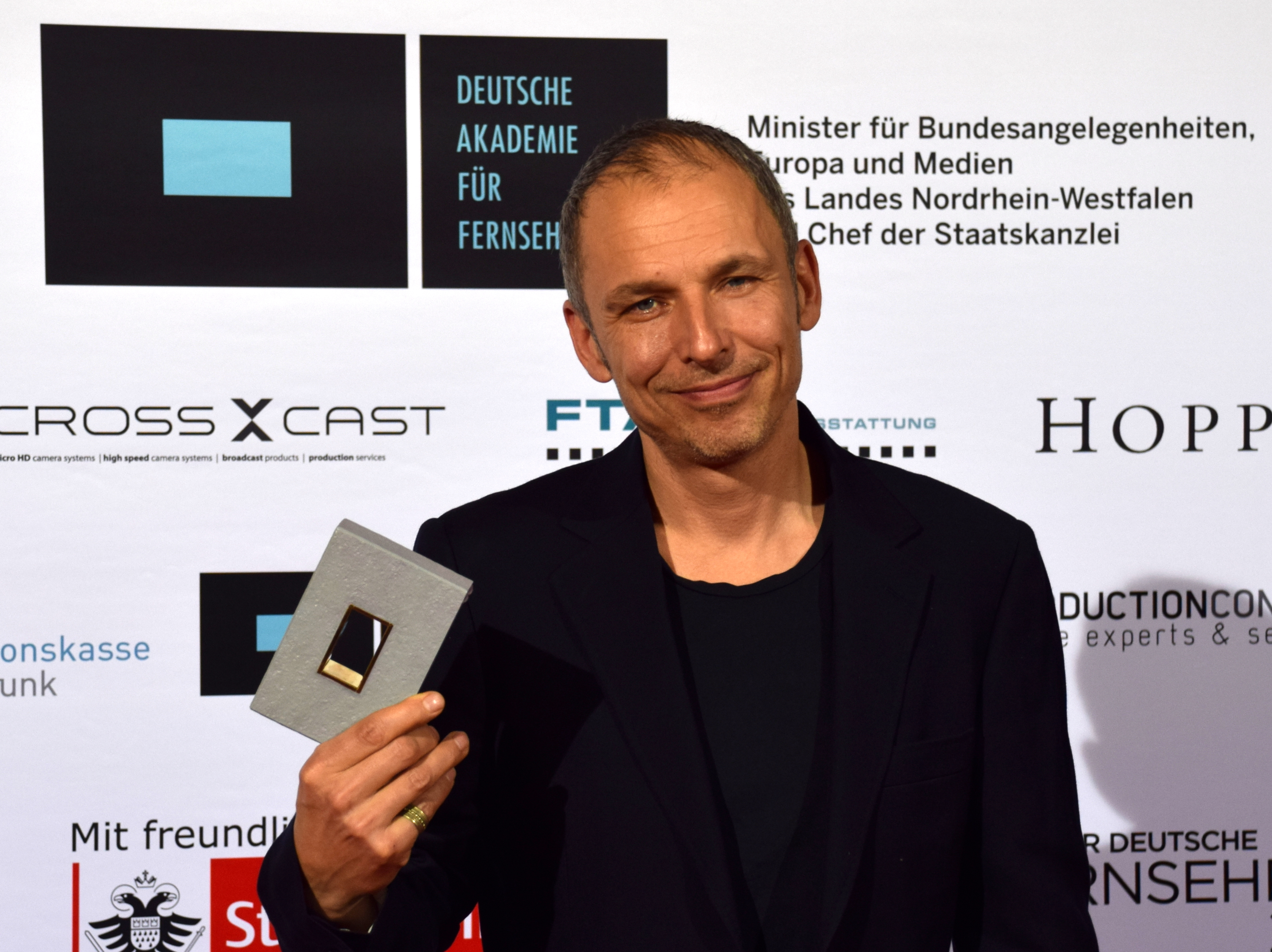 Kolja Brandt (Cinematographer) Deutsche Akademie für Fernsehen - Symposium und Preisverleihung 2015 in Köln